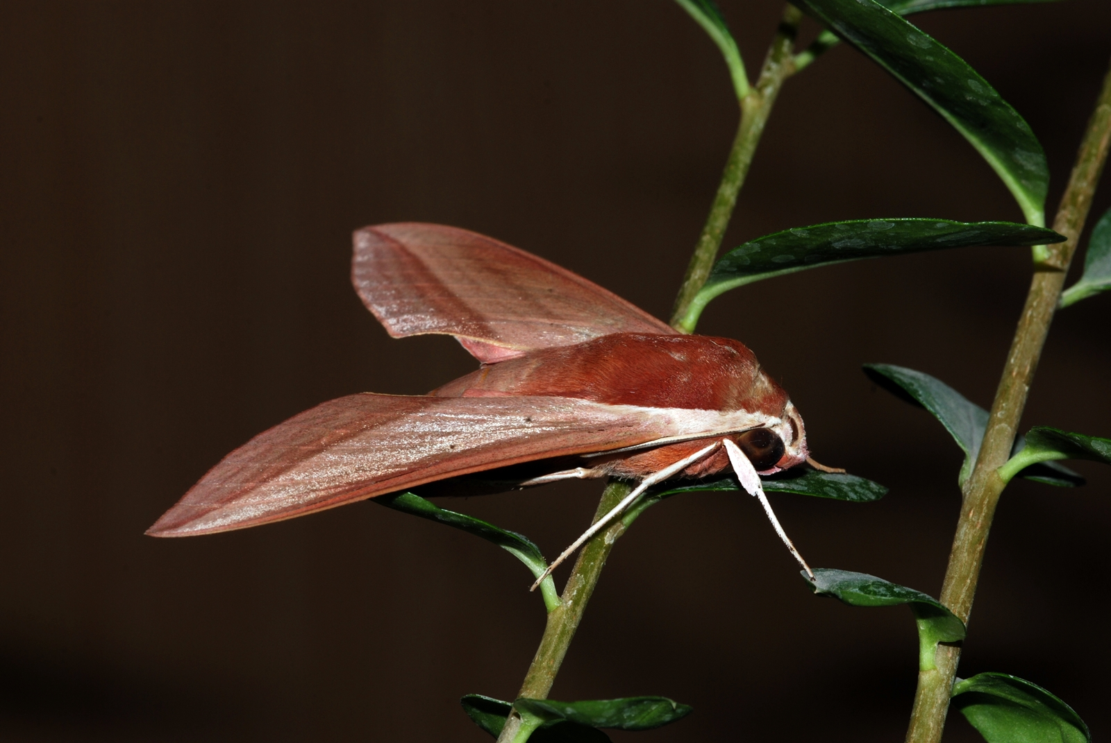 Kurdî: Navê Kurdî nehatiye tespît kirin.